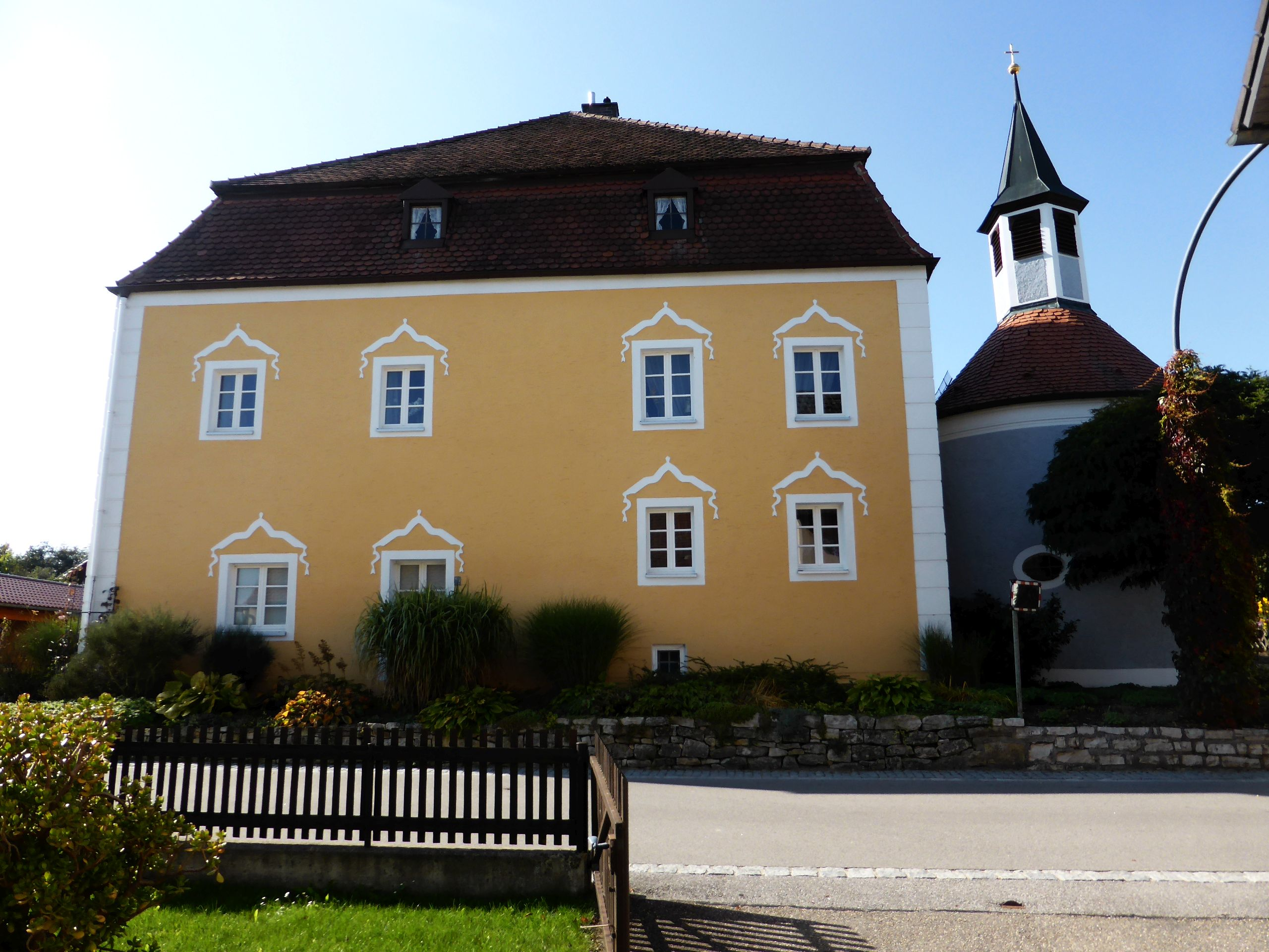 Hofmarksschloss Wischenhofen